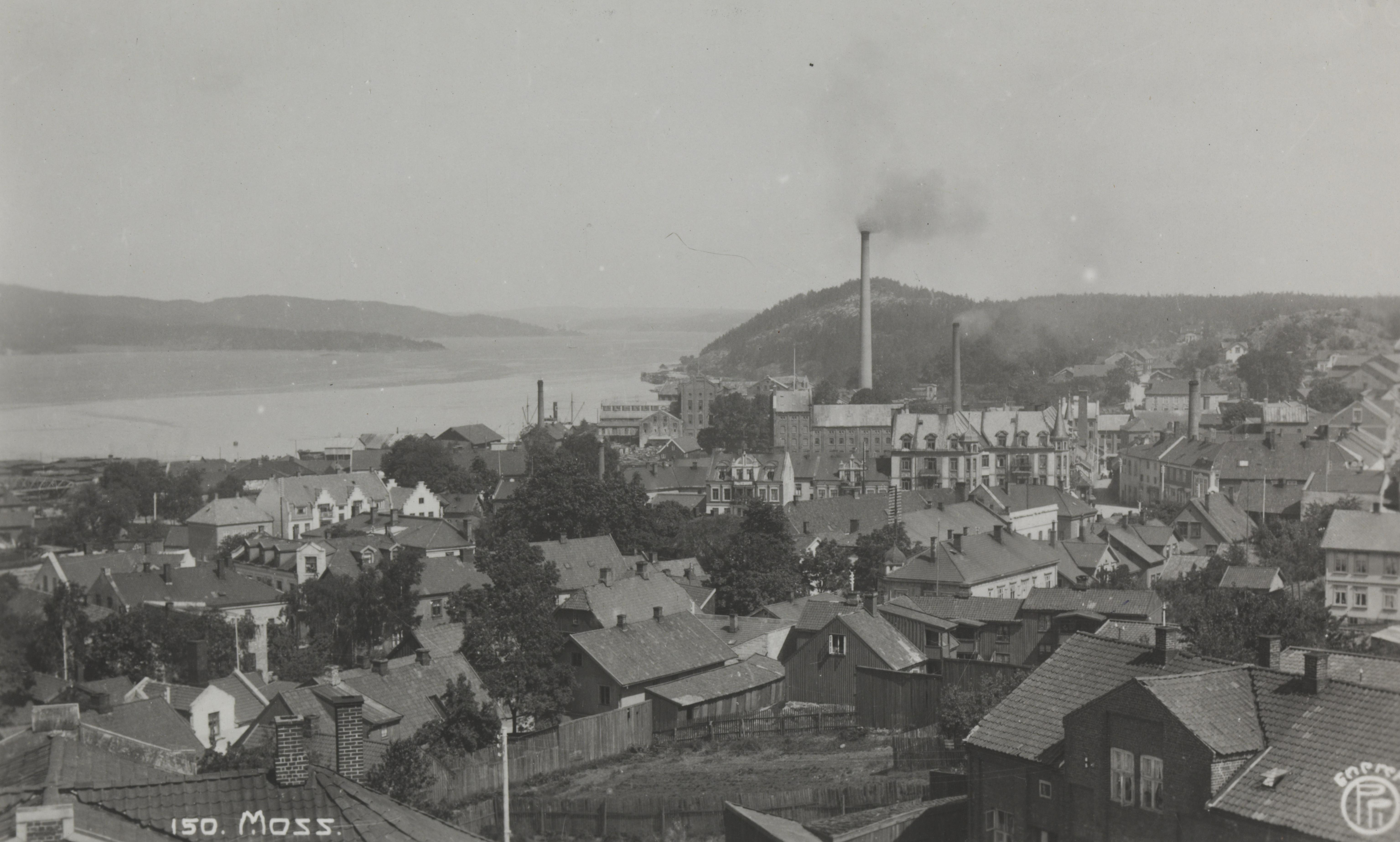 Bildet er hentet fra Nasjonalbibliotekets bildesamling Moss, Moss, Østfold